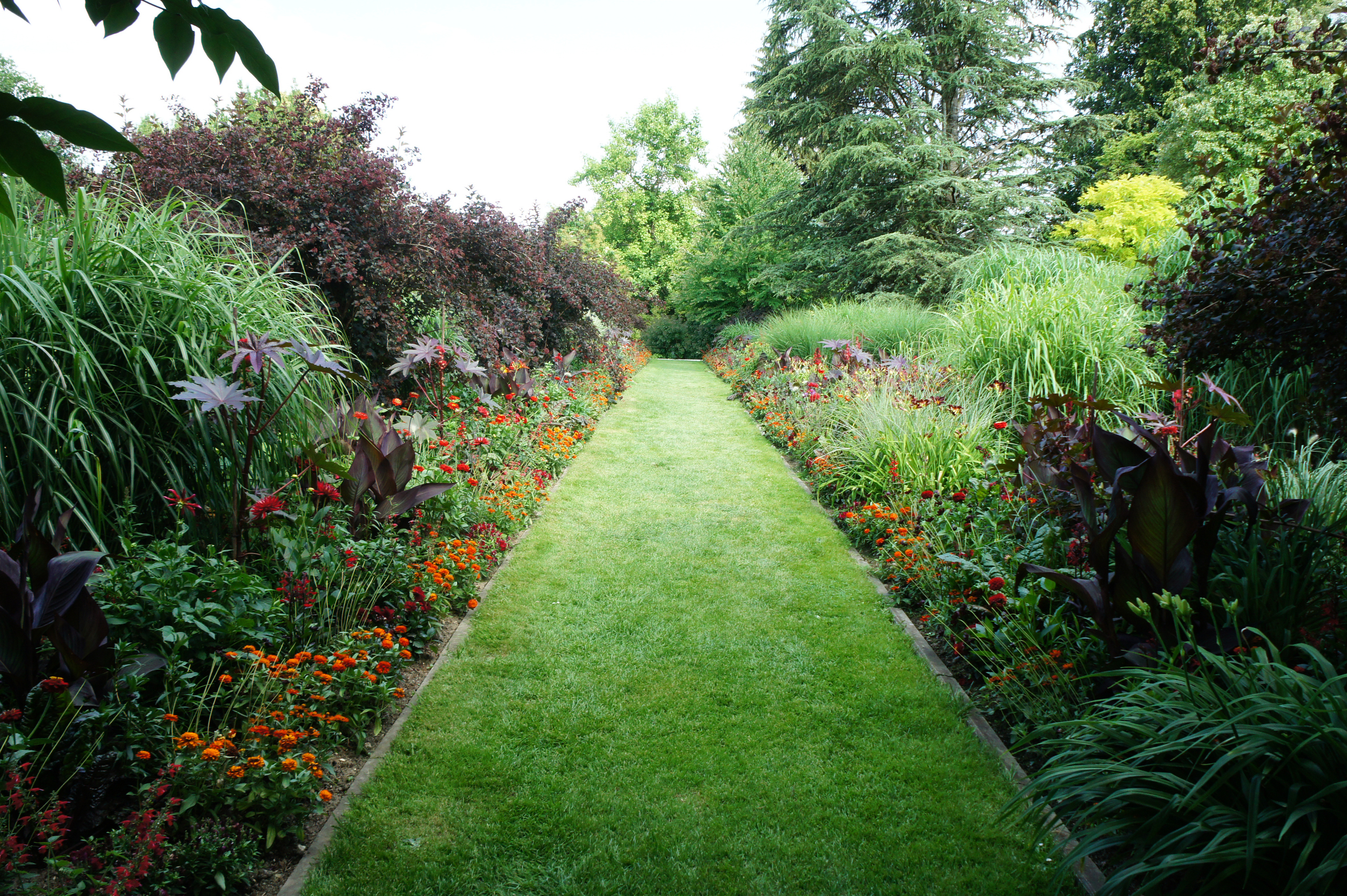 Sichtungsgarten Freising